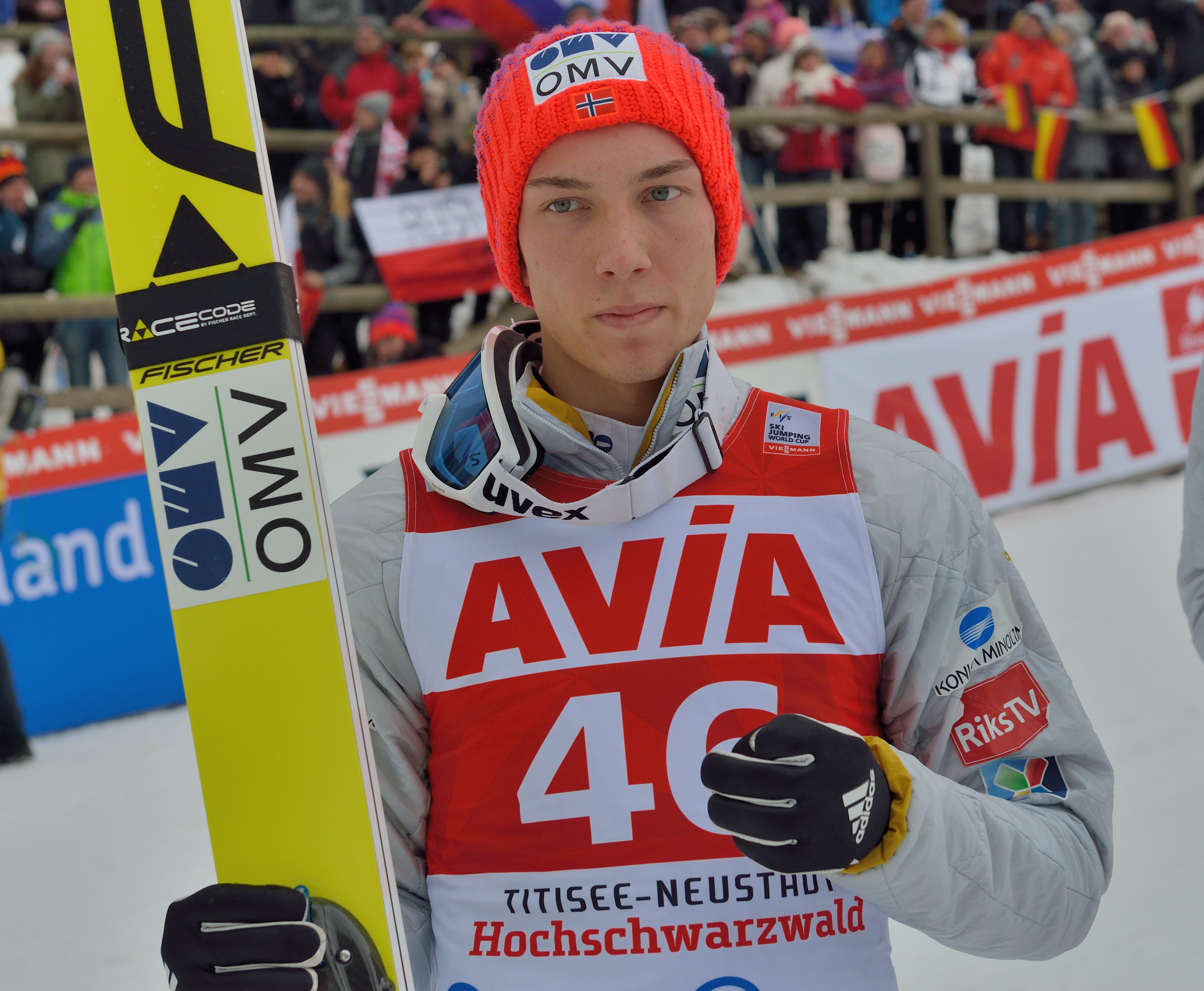 FIS Ski Weltcup Titisee-Neustadt 2016: Johann Andre Forfang